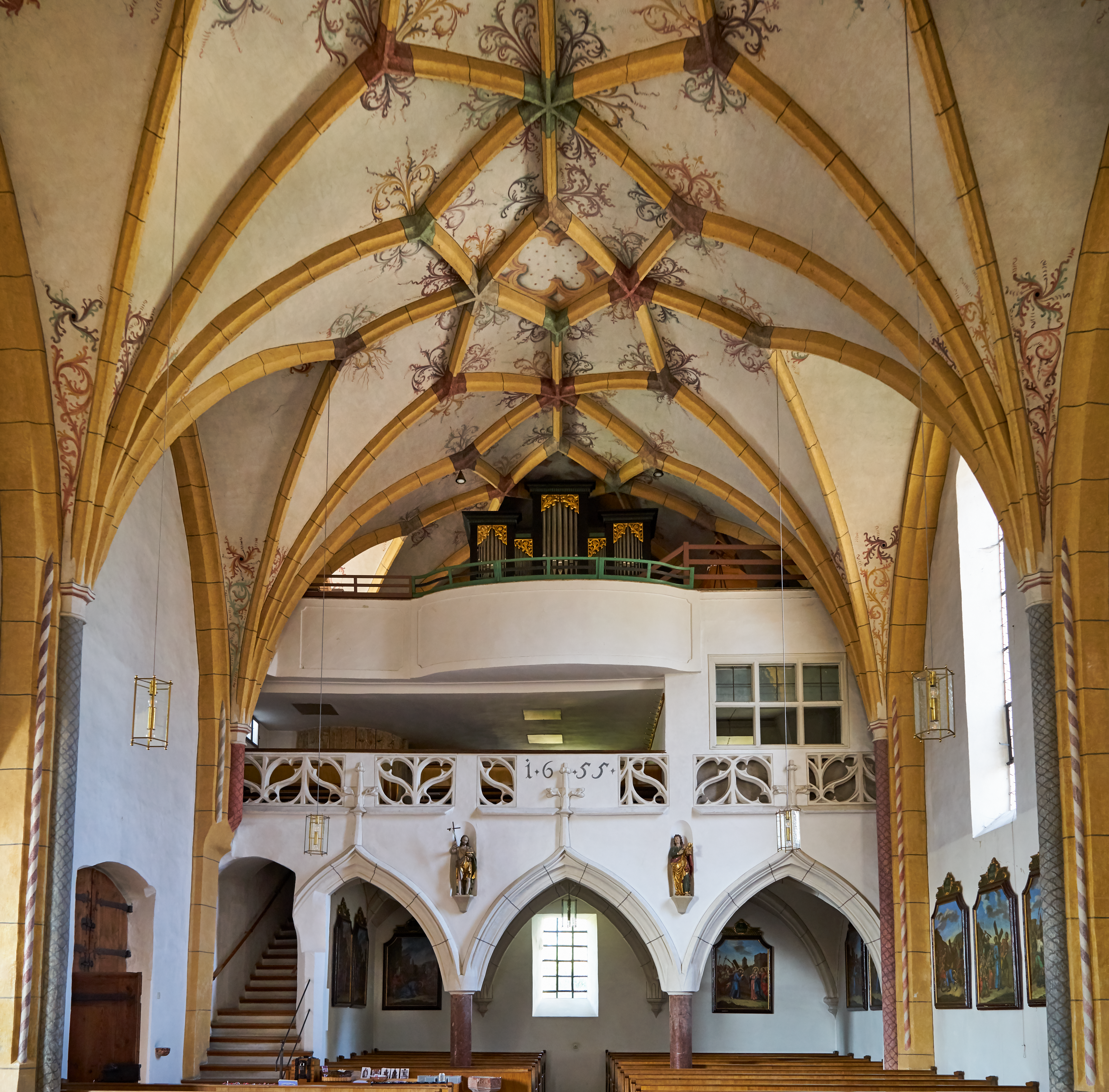 Katholische Pfarrkirche Mariä Himmelfahrt Ering. Blick auf die zweigeschossige Empore mit der Orgel von 1953.